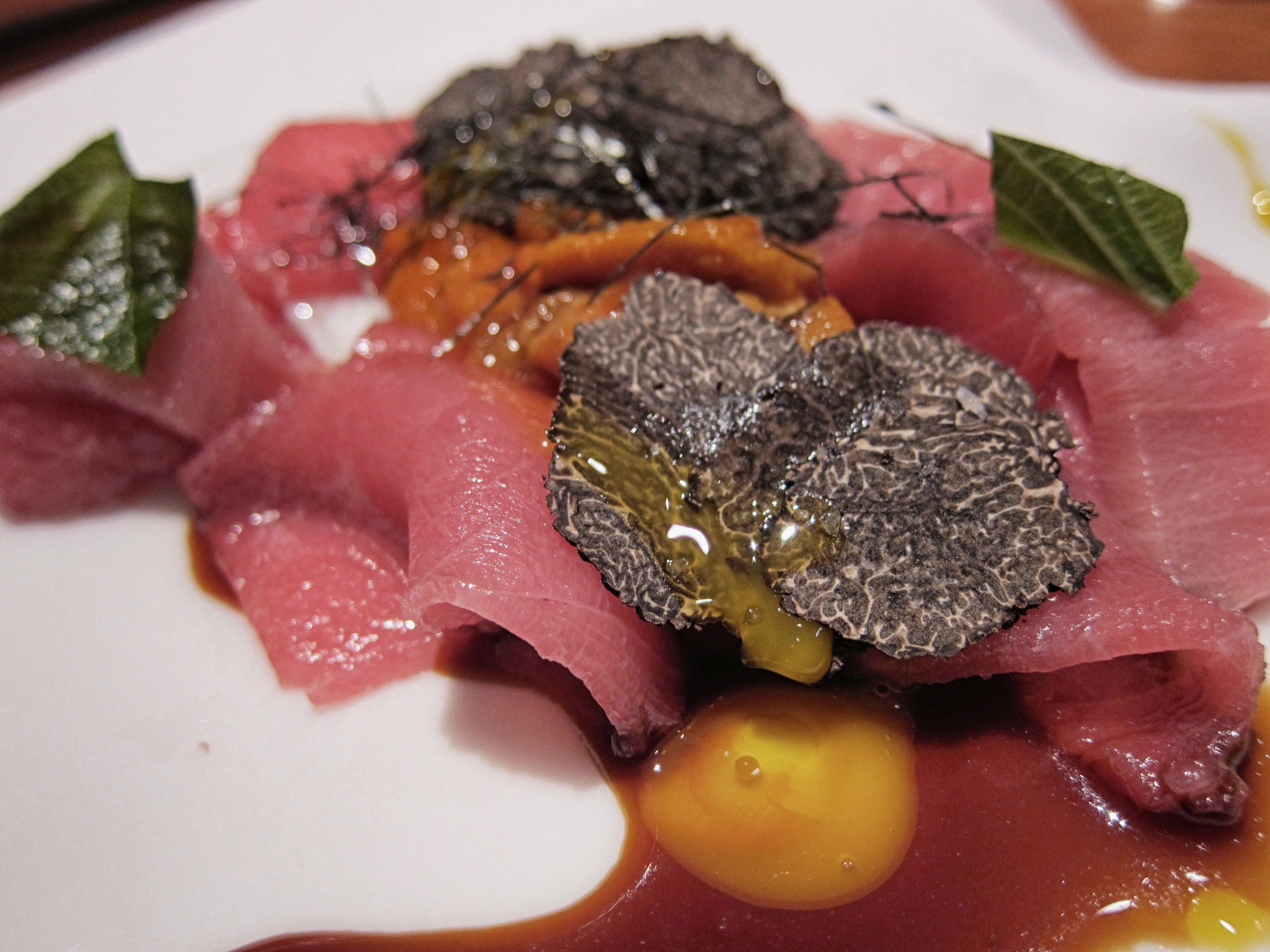 Toro con erizo de mar y trufa